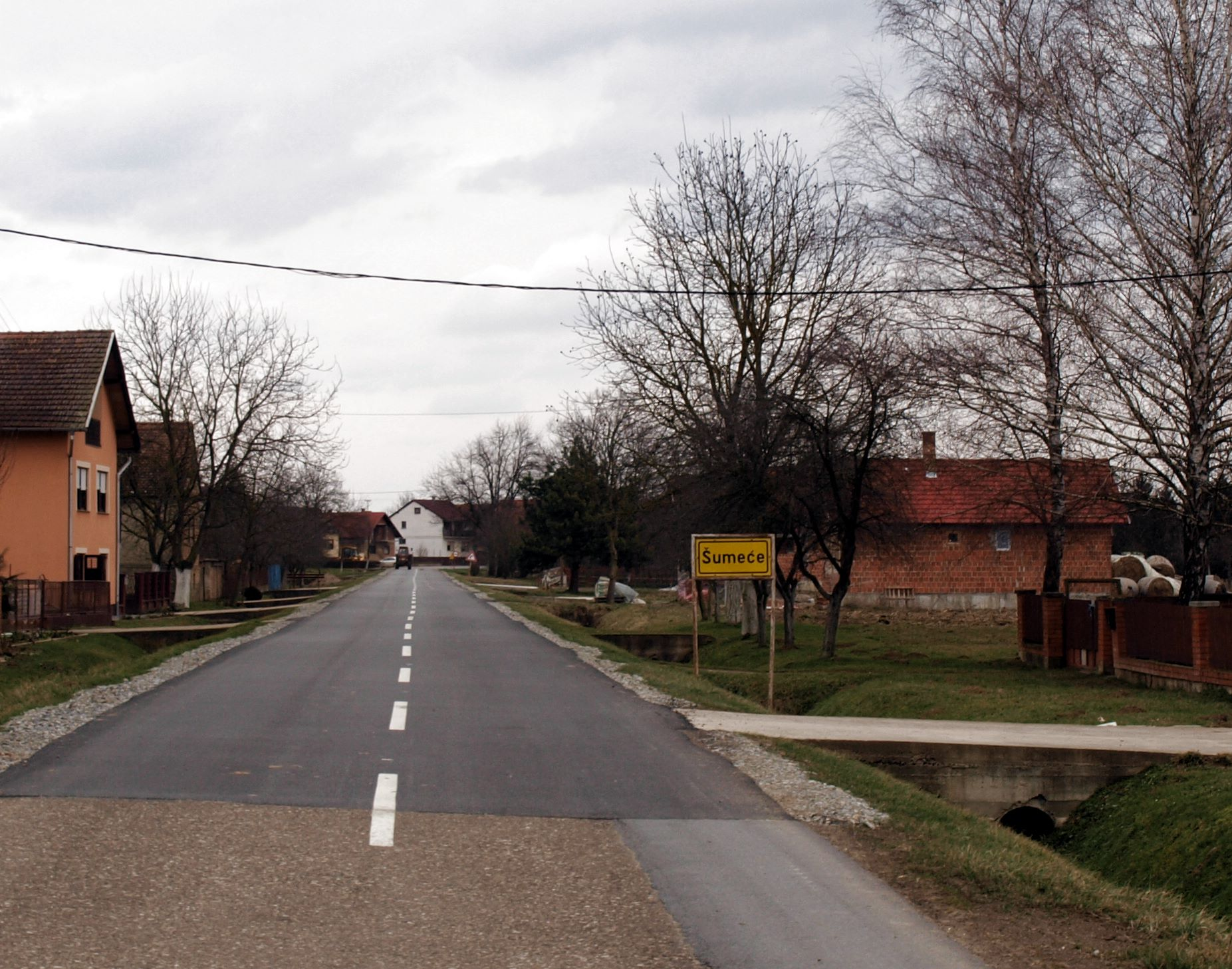 Ulaz u selo Šumeće, Brodsko-posavska županija.